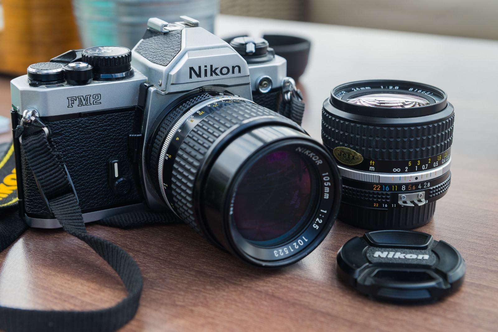 Cámara Nikon FM2n con un Nikkor 105mm f/2,5 AI-S y un Nikkor 24mm f/2,8 AI-S en el fondo de la imagen.